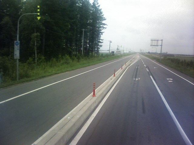 北海道道1157号線